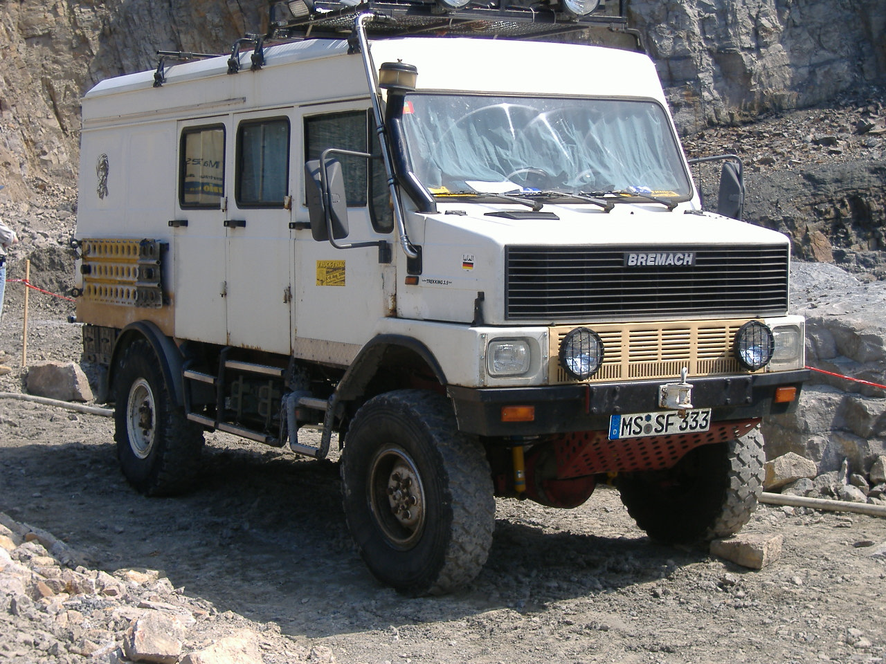 Bremach LKW Varese Italien / Allradfahrzeug 4x4 mit Iveco Motor (gebaut von 1983-88)